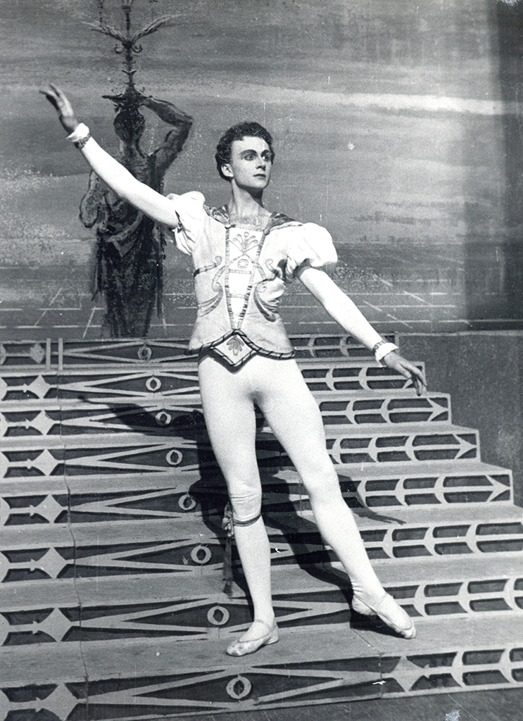 Janez Mejač kot Princ, Sergej Prokofjev, Pepelka. Balet v treh dejanjih po libretu Nikolaja Volkova. Opera SNG v Ljubljani, koreografja in režija Pia Mlakar in Pino Mlakar, premiera 11. 3. 1959.